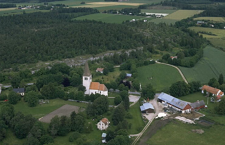 Linde kyrka Motiv: Linde Nyckelord: Flygbilder, Riksintressen Kategori: KyrkomiljöLinde kyrka.